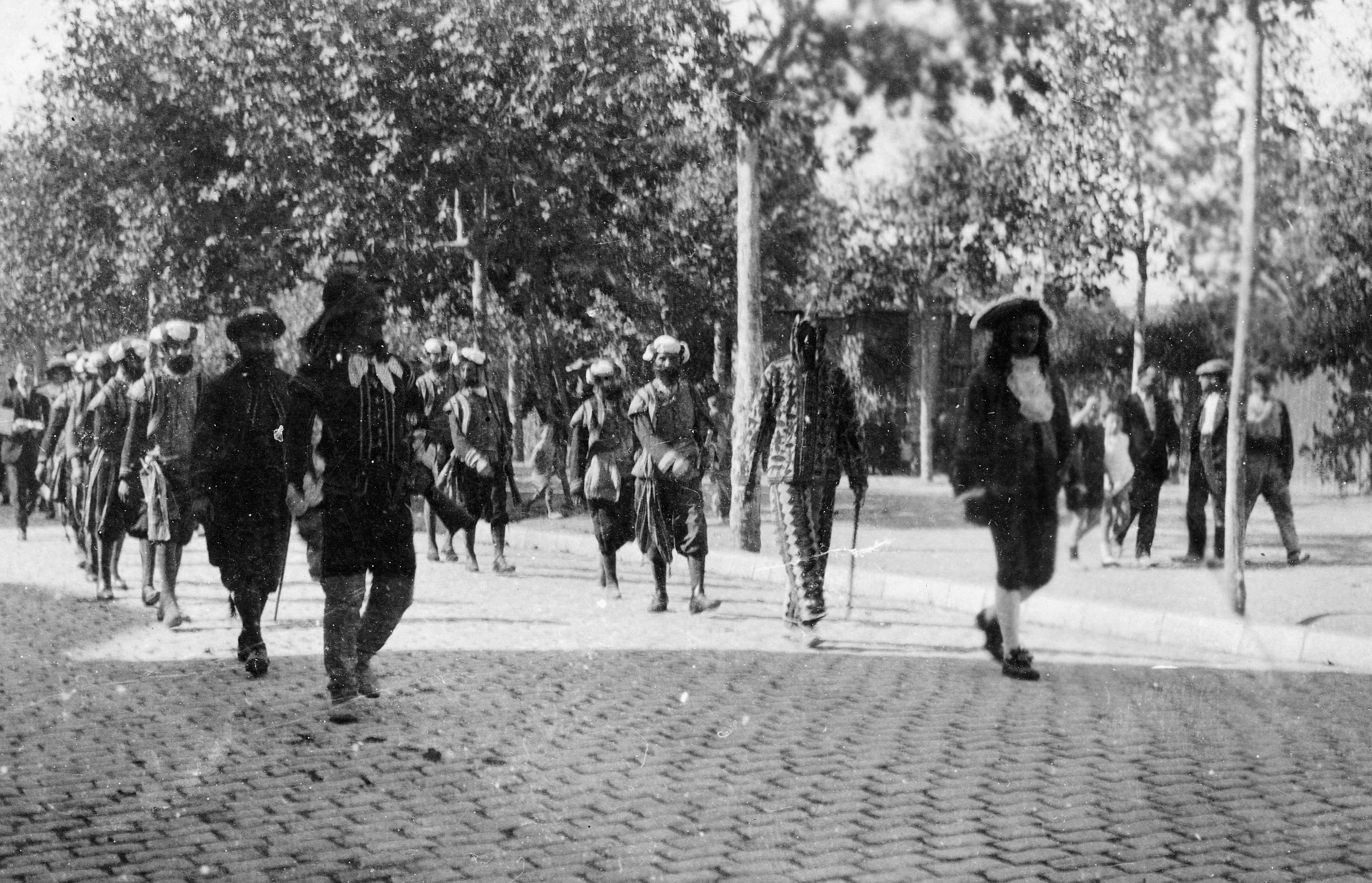 ball parlat